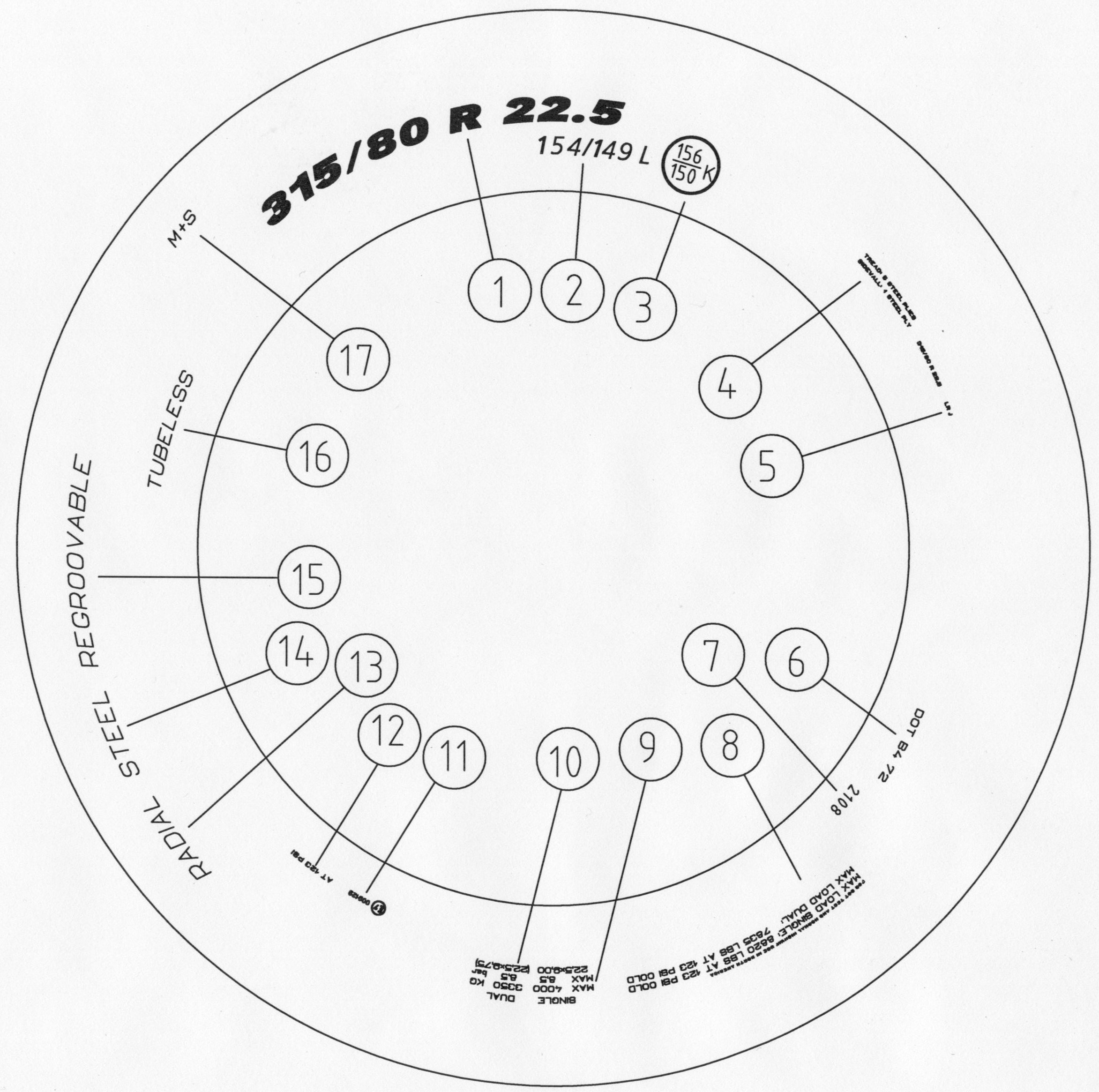 Tyre sidewall marking. Tire lettering